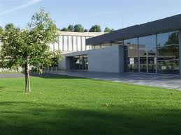 Scharpoord